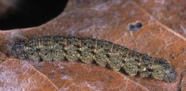 Zanclognatha dentata.